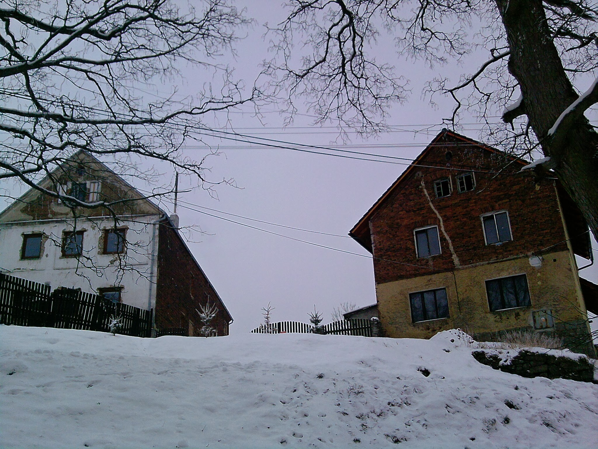 Otročín, Czech Republic